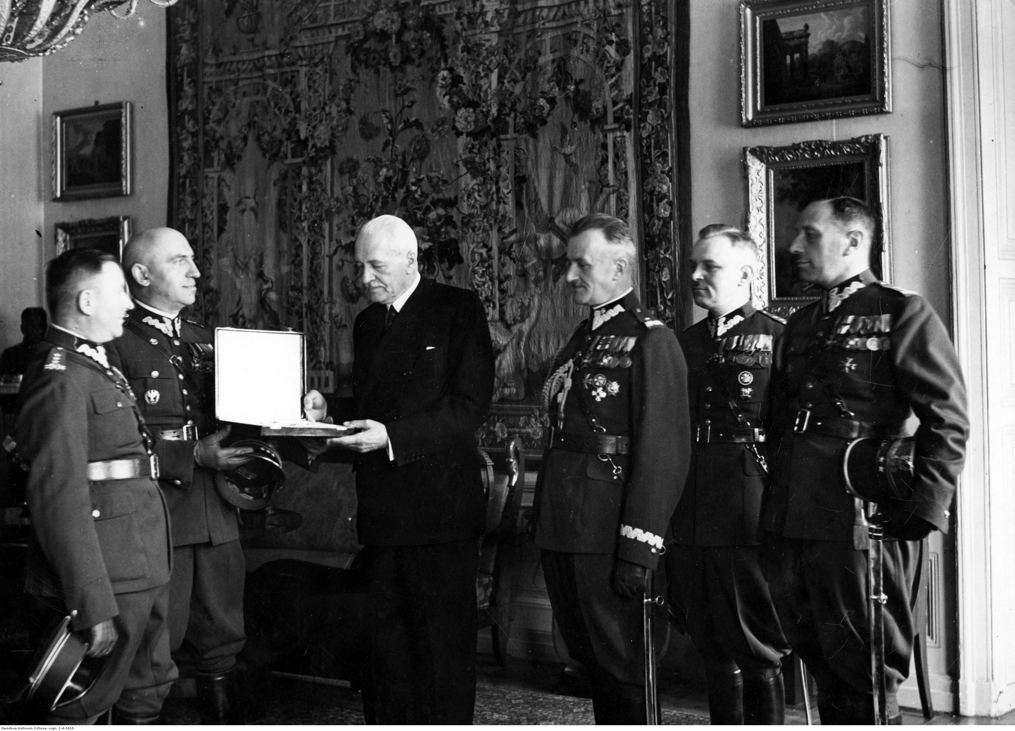 Delegacja 27 Dywizji Piechoty na audiencji u prezydenta RP Ignacego Mościckiego w związku z wręczeniem prezydentowi odznak pułkowych i zaproszeniem na święto dywizji. Prezydent RP Ignacy Mościcki odbiera odznaki pułkowe i zaproszenie na święto dywizji . Widoczny m.in.: generał Juliusz Drapella (trzeci z prawej). Koncern Ilustrowany Kurier Codzienny - Archiwum Ilustracji. Sygnatura: 1-A-1410